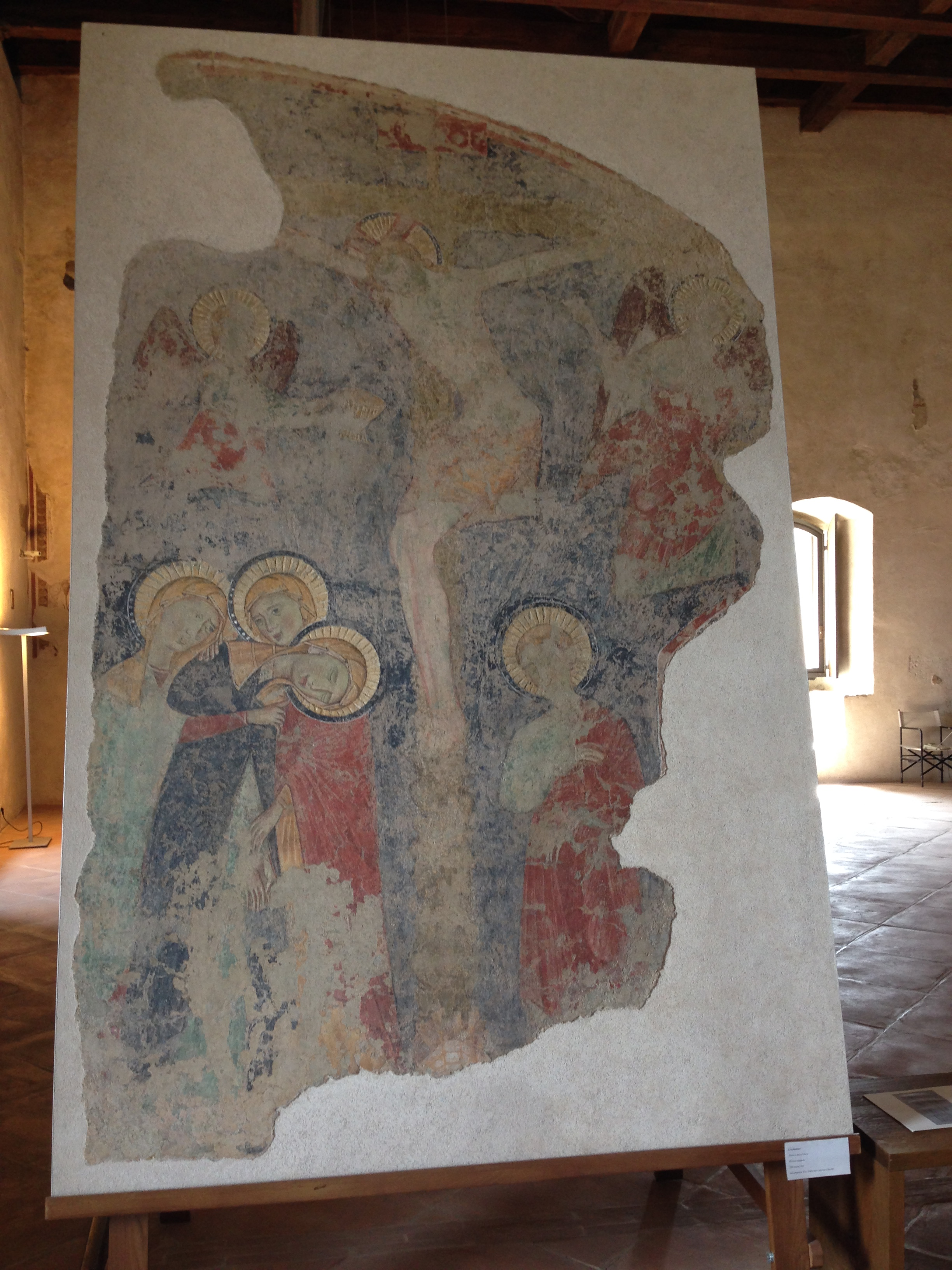 Maestro delle Palazze. Crocifissione. Spoleto